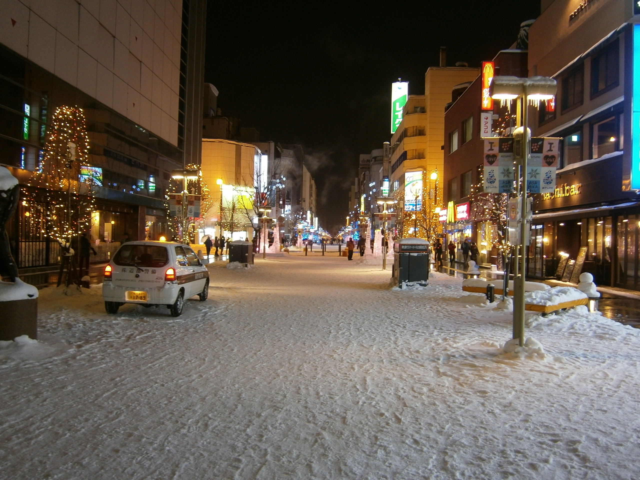 Asahikawa Winter Festival 2012